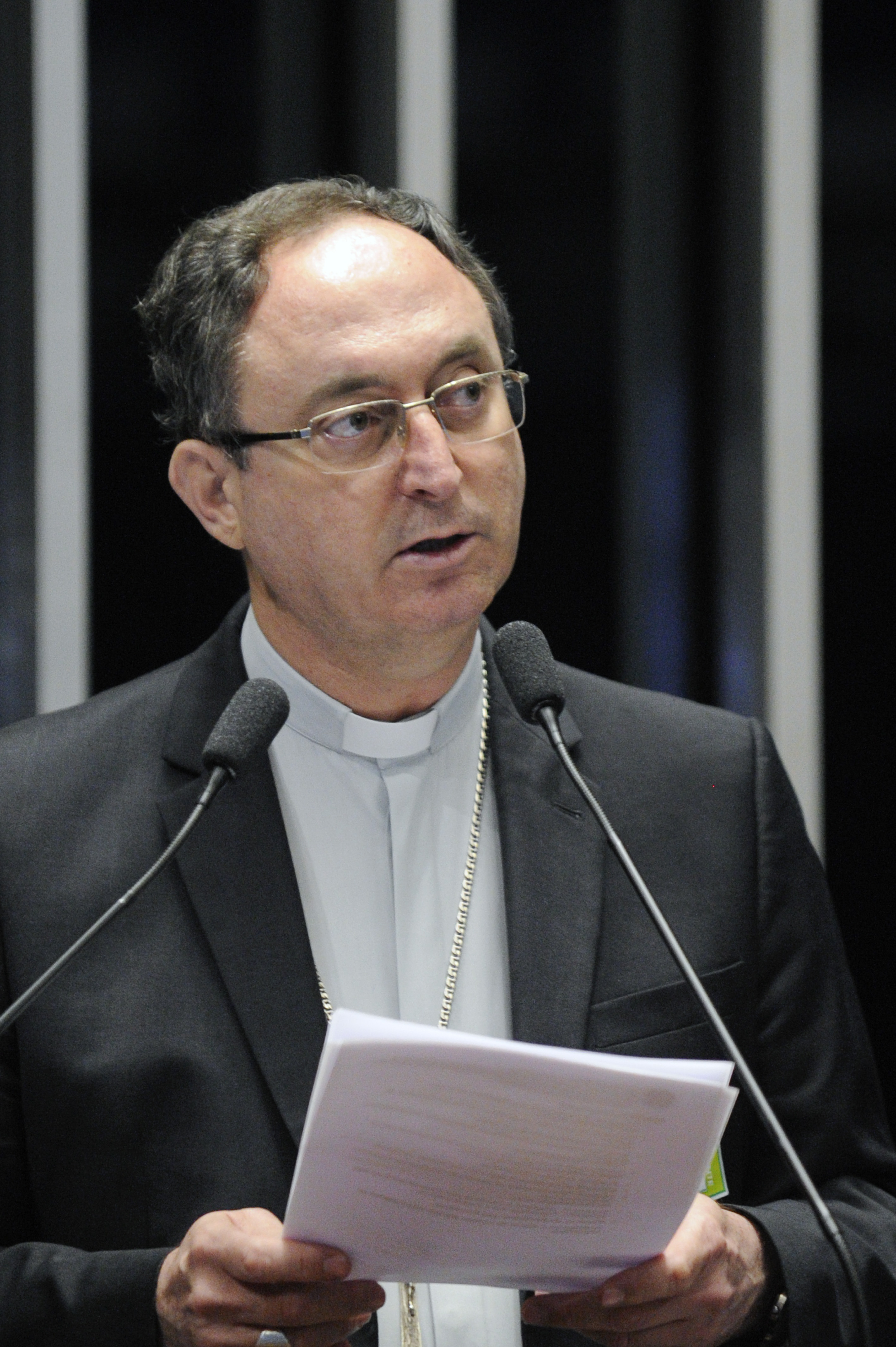 Plenário do Congresso Nacional durante sessão solene destinada a homenagear a Campanha da Fraternidade de 2016, promovida pela Conferência Nacional dos Bispos do Brasil, com o tema "Casa Comum, nossa responsabilidade". Em discurso, o arcebispo da Arquidiocese de Brasília e presidente da Conferência Nacional dos Bispos do Brasil, Dom Sérgio da Rocha. Foto: Edilson Rodrigues/Agência Senado